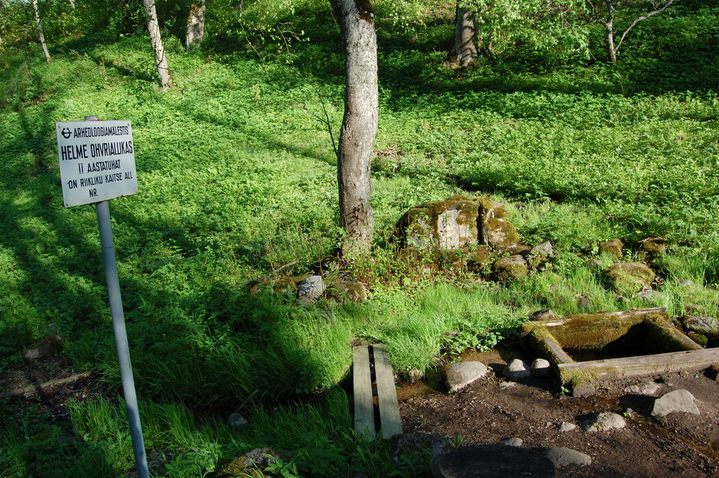 Helme ohvriallikas